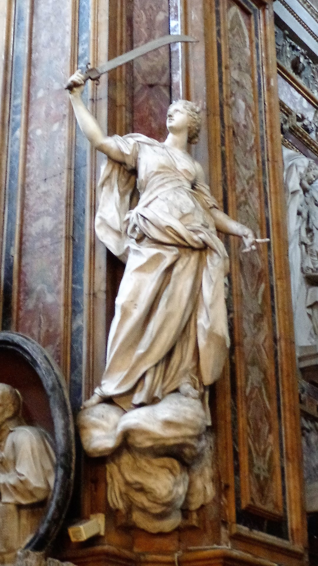 Statua in stucco Giustizia pilastro della crociera.